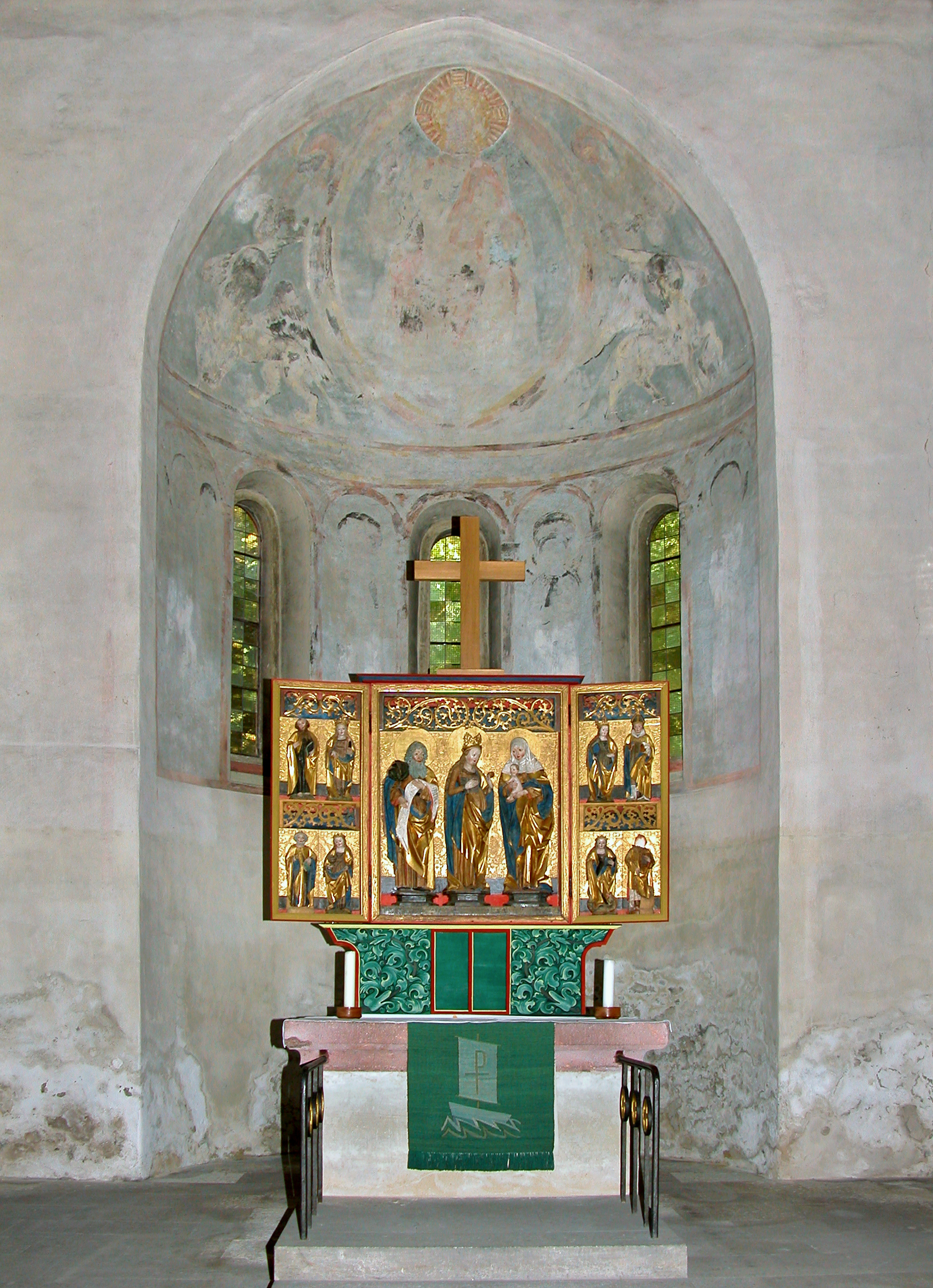 18.08.2019 04552 Borna, Kunigundengasse: Kunigundenkirche (GMP: 51.123035,12.502923). Die dreischiffige romanische Backstein-Pfeilerbasilika wurde um 1170 erbaut. Reste von Wandmalereien aus der Bauzeit zeigen eine Majestas Domini in der Hauptapsis. Der spätgotische 1502 datierte Schnitzaltar stammt aus der abgerissenen Kirche in Görnitz (Borna). Er zeigt im Schrein die Heiligen Joachim, Maria und Anna mit dem Jesuskind. [DSCN38574.TIF]20090818310DR.JPG(c)Blobelt